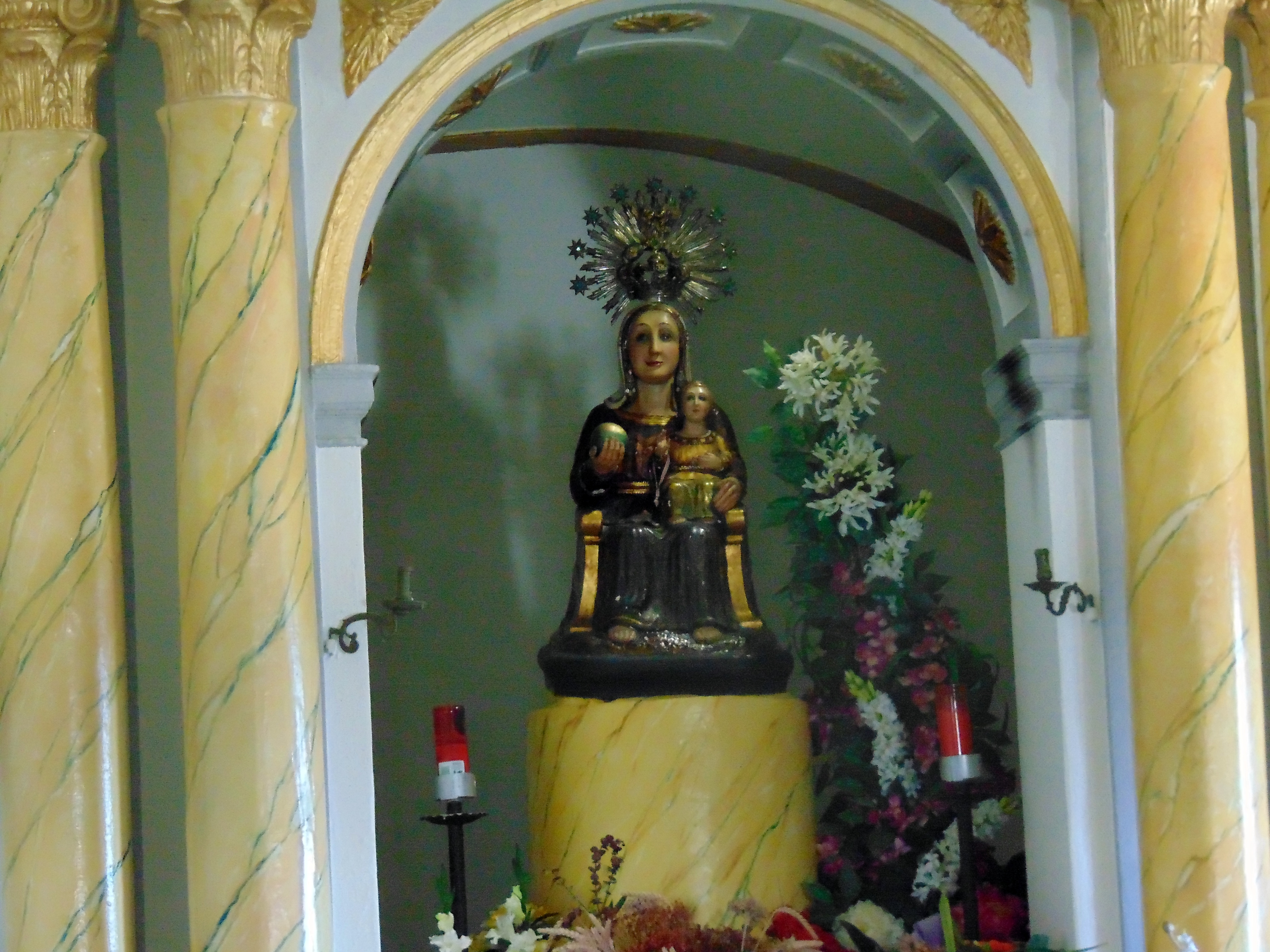 Santuari de la Mare de Déu del Cós (Montagut i Oix)